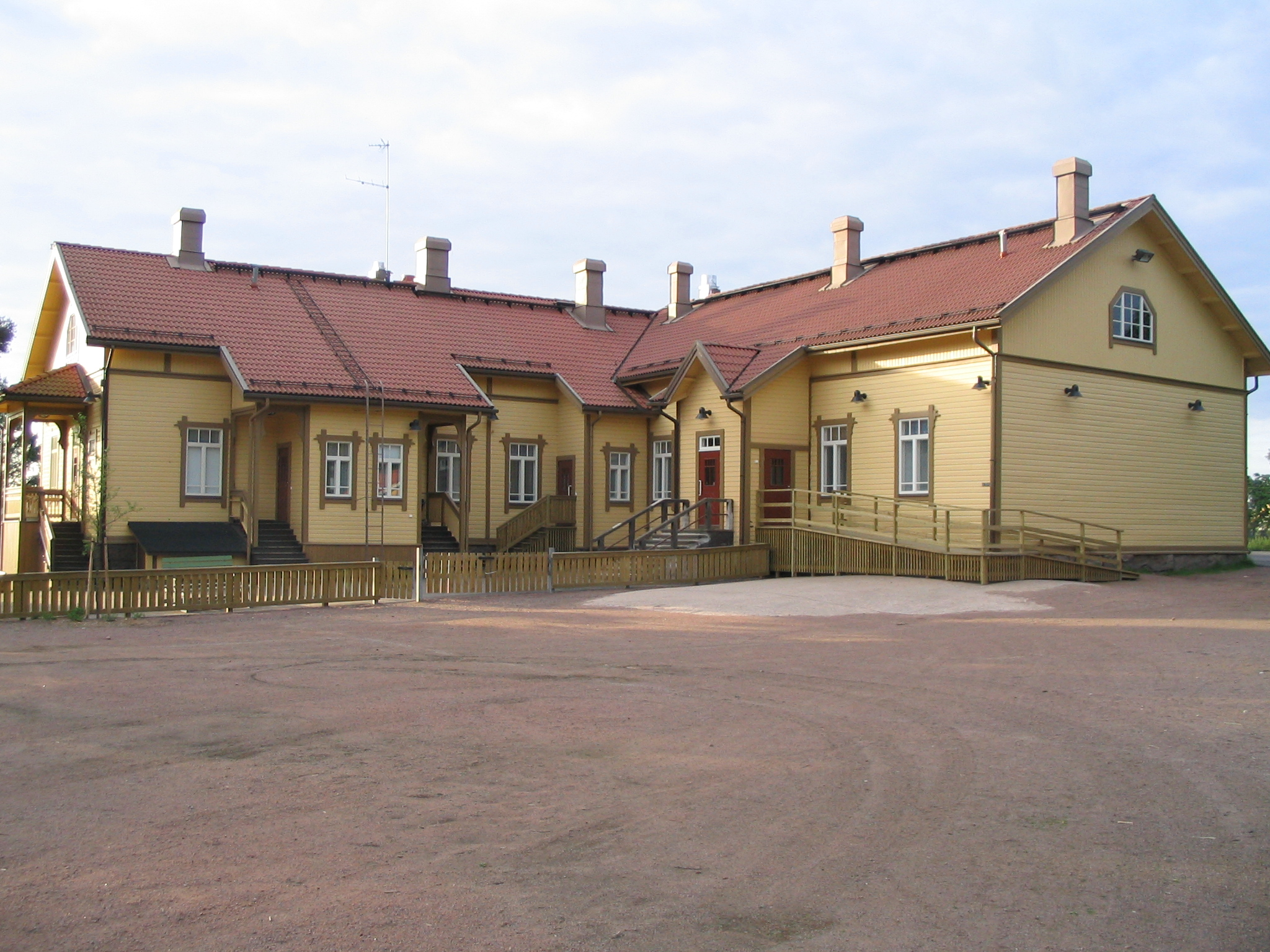 Korkeakosken peruskoulun vanhin rakennus Kotkassa.